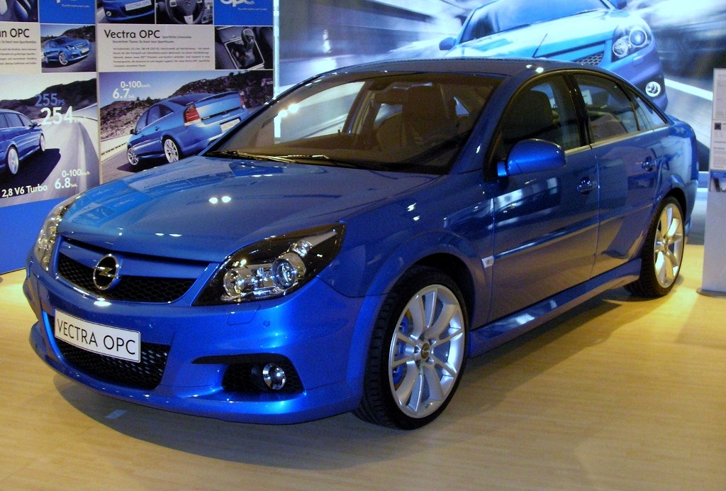 Description: Opel Vectra, im Opel Zentrum in Berlin an der Friedrichstraße. The Opel Vectra, image taken at the Opel Zentrum in Berlin at Friedrichstraße. Source: self-made, I release it into the public domain. Gryffindor 17:50, 9 March 2006 (UTC)